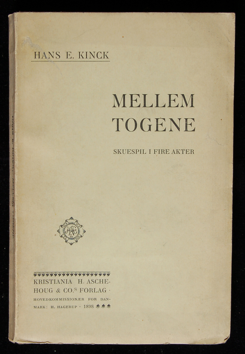 Skuespill utgitt på Aschehougs forlag